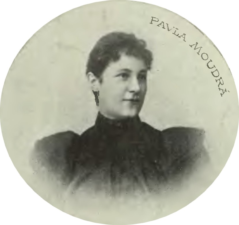 Portrét – Pavla Moudrá (1861 - 1940), Česká spisovatelka a překladatelka.